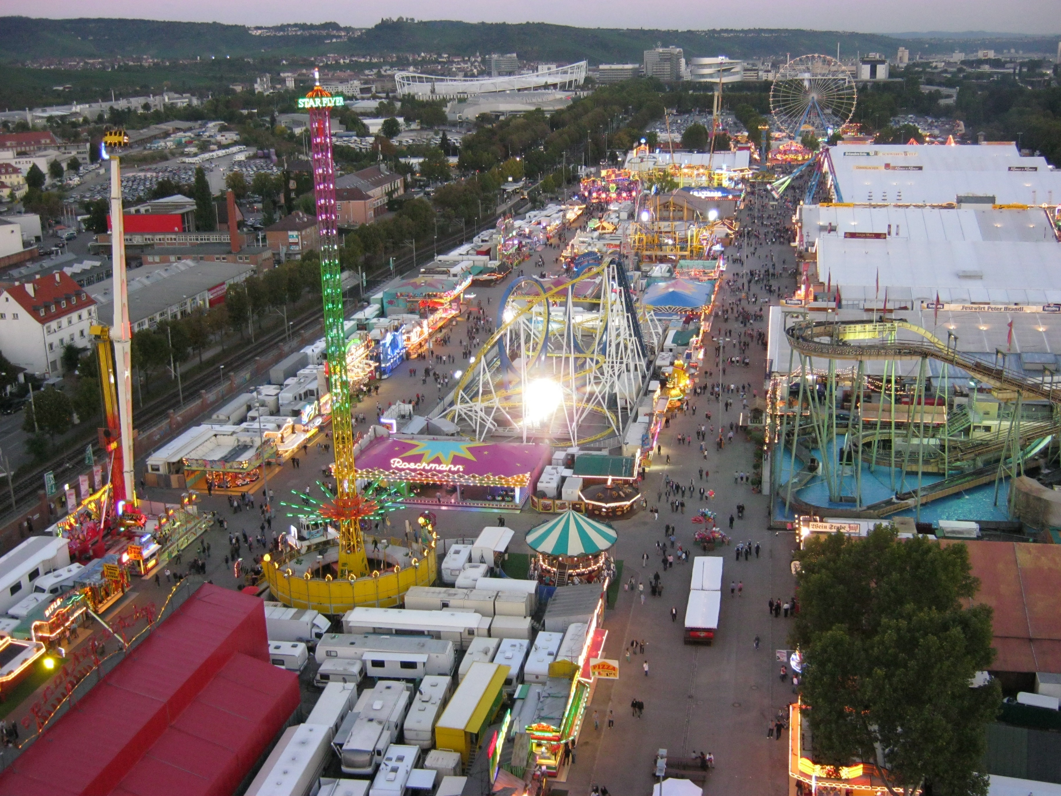 Cannstatter Volksfest 2012 fotografiert vom 60 Meter Riesenrad - OpenStreetMap(Info)